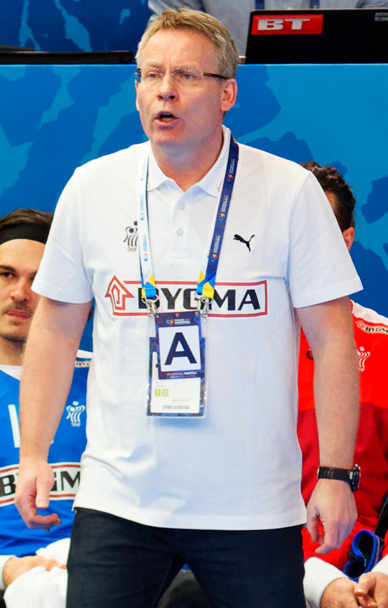 Match de la phase préliminaire du championnat du monde masculin de handball 2017 entre l'Egypte et le Danemark (Groupe D). A Bercy, le 14 janvier 2017.